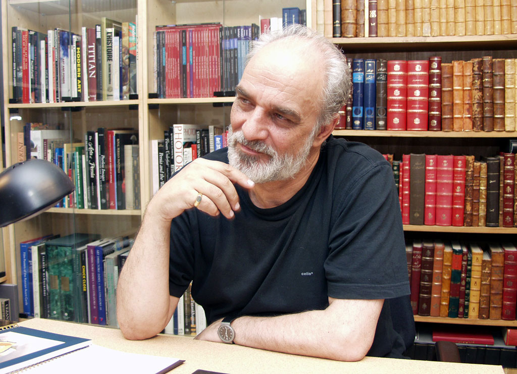 Iranian painter Aydin Aghdashloo. Summer 2004 - Tehran, Iran.